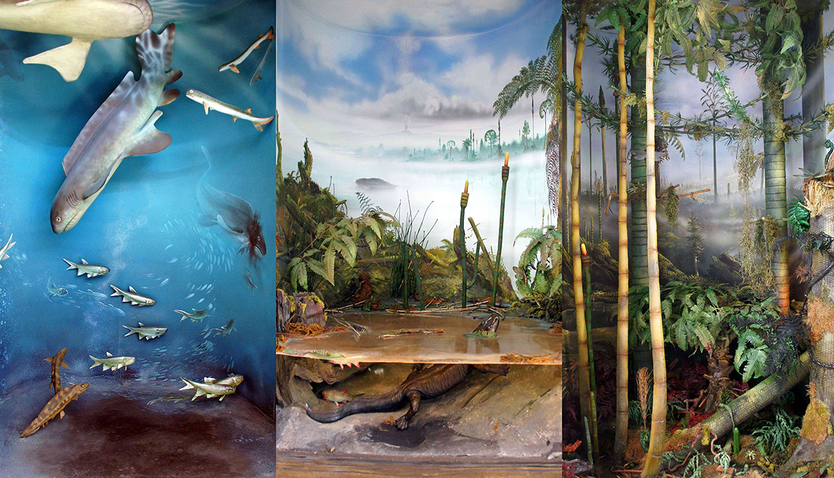 Großdioramen zur Pfälzer Urzeit im Urweltmuseum GEOSKOP als Illustration der drei fossil überlieferten Lebensräume See, Uferzone und Wald.